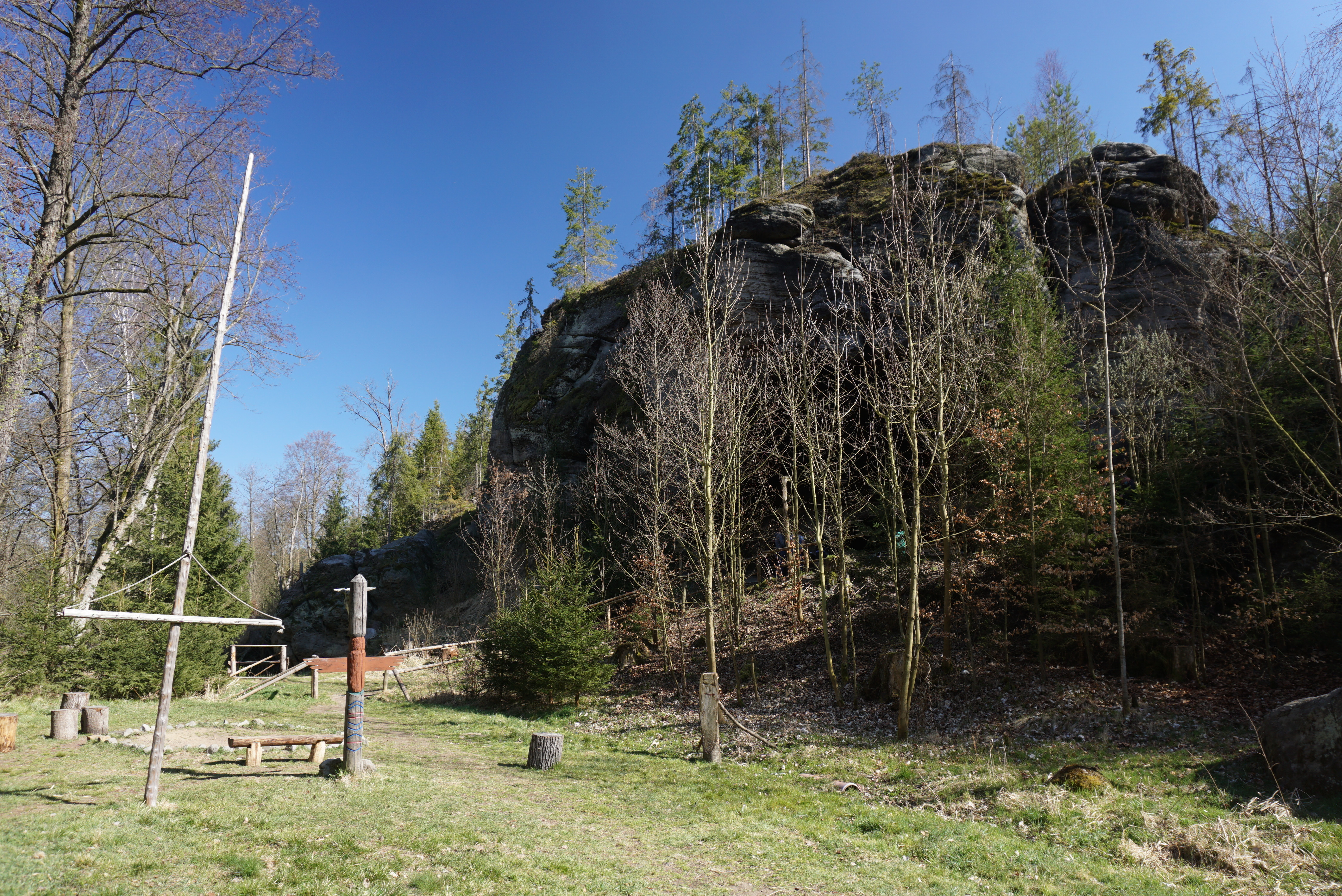 Vejrov - pozůstatky hradu u Velenic (u Zákup) - pohled na hradní skálu z údolí, od severozápadu, od trampské osady Medvědí camp